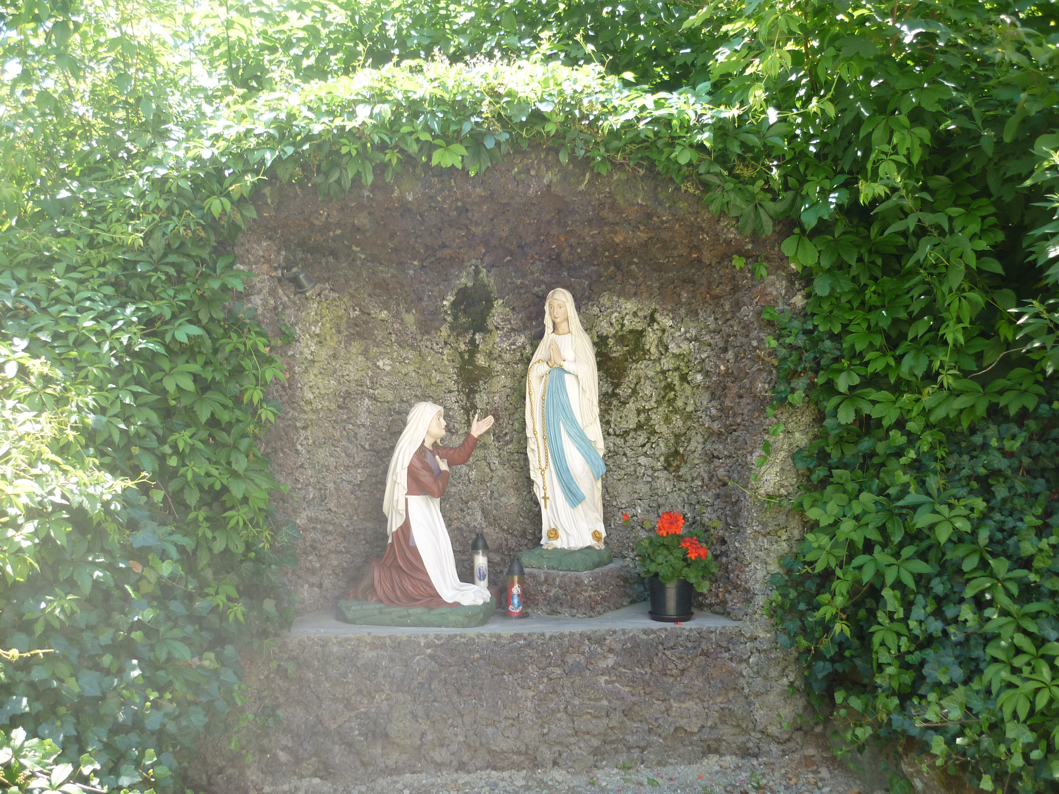 Lourdesgrotte bei der Pfarrkirche St. Petrus Wörth an der Donau